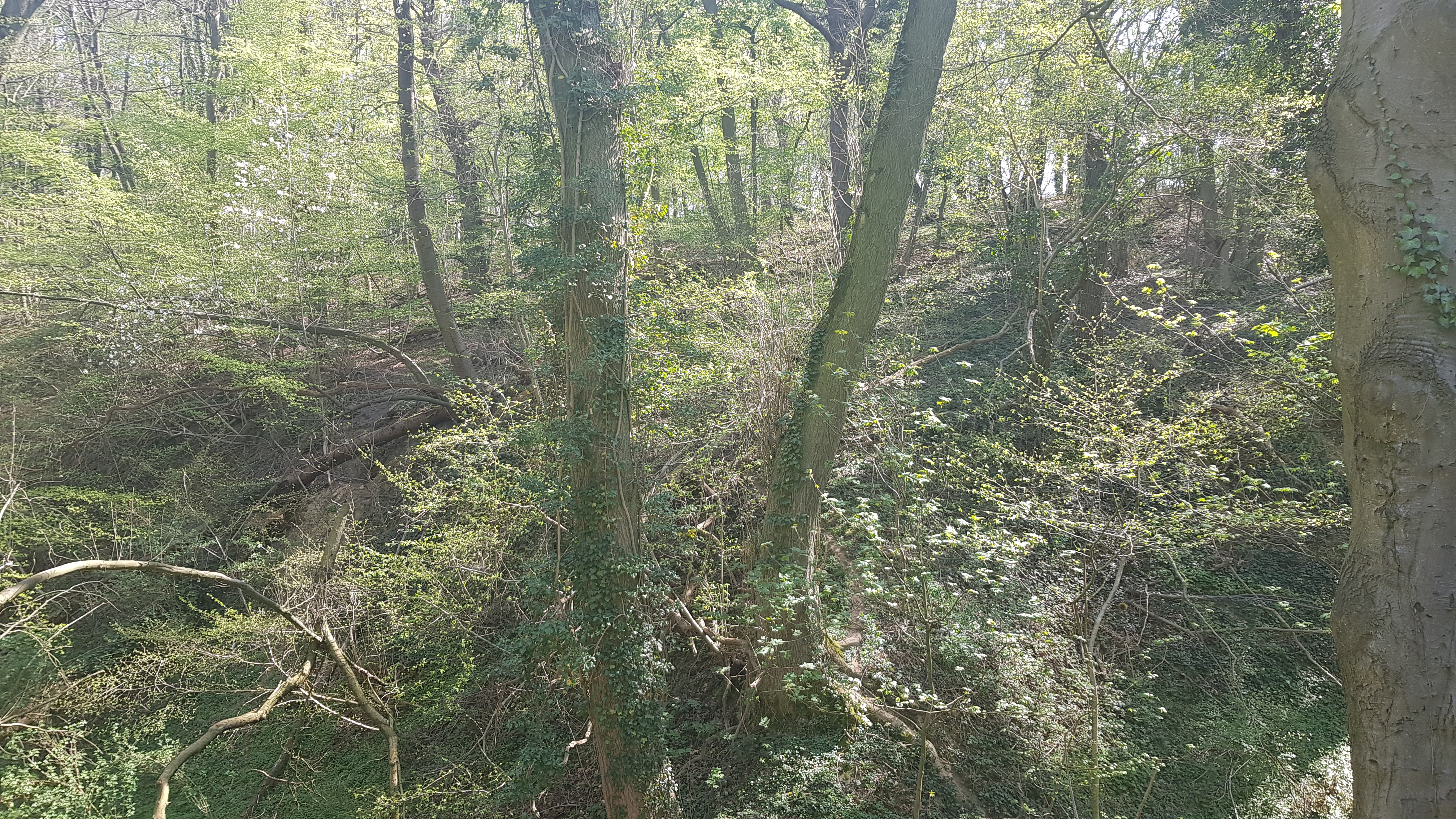 omgeving van de Groeve van de Scheve Spar I in het Sint-Jansbosch, Oud-Valkenburg, Nederland